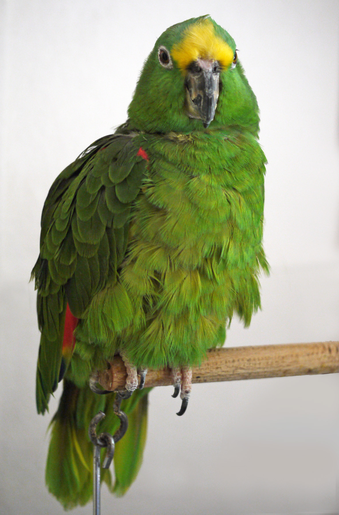 Gelbscheitelamazone